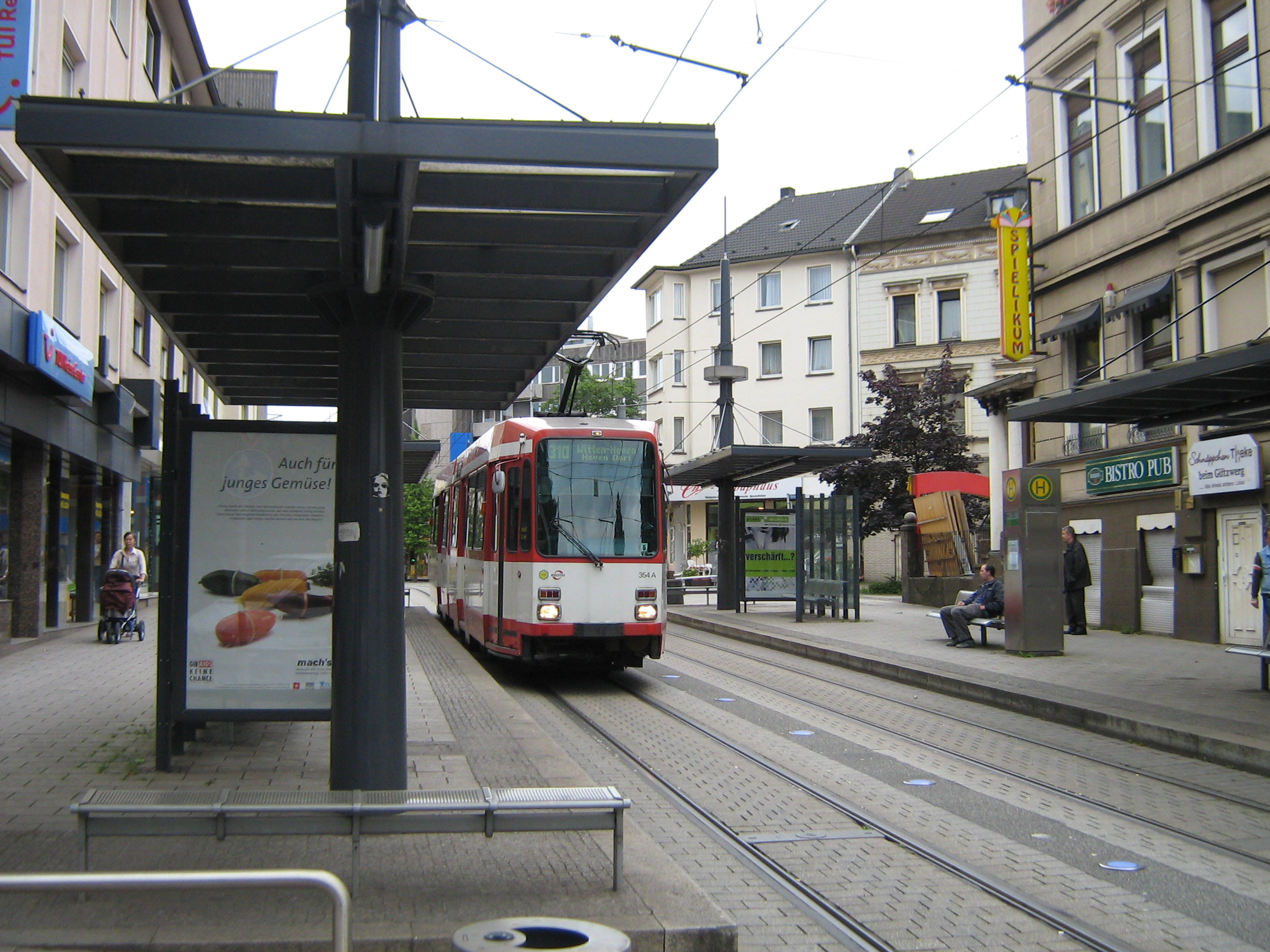 M6 der Bogestra auf der Linie 310 an der Haltestelle Bahnhofstraße in Witten.